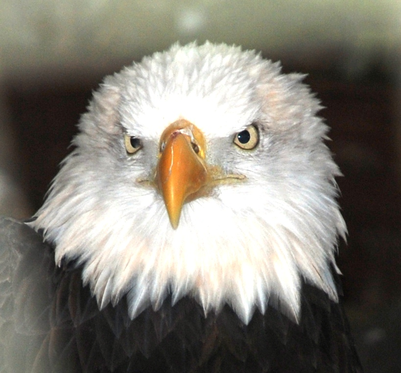 Bald Eagle